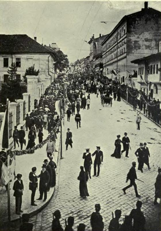 Belgrado tras el asesinato de Alejandro y Draga en junio de 1903.